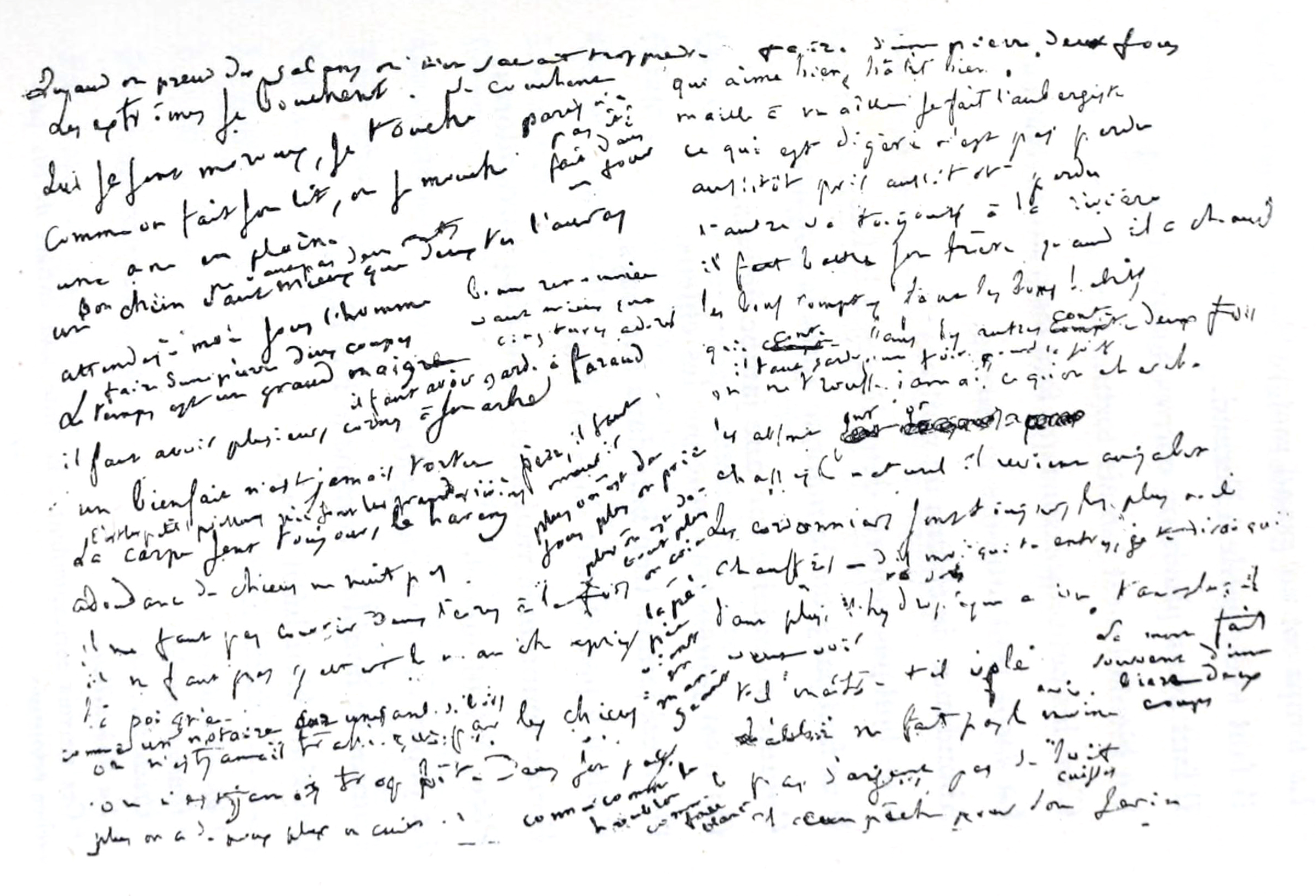 Facsimilé de manuscrit dans Pensées, sujets, fragmens. Transcription: Quand on prend des salons on n'en saurait trop prendre Les extrêmes se bouchent Comme on fait son lit on se mouche Paris n'a pas été fait dans un four Un âne en plaine ne vaut pas deux rats Un bon chien vaut mieux que deux tu l'auras Attendez-moi sous l'homme Bonne renommée vaut mieux que cinq turcs adorés Faire d'une pierre deux coupes Le temps est un grand maigre Il faut avoir garde à Faraud Il faut avoir plusieurs cornes à son arbre Un bienfait n'est jamais tortu Père, il faut mourir C'est les petits poissons qui font les grandes rivières Abondance de chiens ne nuit pas Il ne faut pas couvrir deux lèvres à la fois Il ne faut pas jeter le manche après la poignée Comme un notaire sur une jambe de bois On n'est jamais trahi que par les chiens On n'est jamais trop bête dans son pays Plus on a de poux plus on cuit Plus on est de fous plus on prie Plus on est debout plus on crie La pépie vient en mangeant Comme le houblon, comme le fou blanc Faire d'une pierre deux sous Qui aime bien bâtit bien Maille à maille se fait l'aubergiste Ce qui est digéré n'est pas perdu Aussitôt pris aussitôt perdu L'autre va toujours à la rivière Il faut battre son frère quand il a chaud Les bons comptes font les bons habits Qui conte sans les autres conte deux fois Il faut garder une foire pour la soif On ne trouve jamais ce qu'on cherche Les absents ont or Chassez le naturel, il revient en jabot Les cordonniers sont toujours les plus mal chauffés Dis-moi que tu entres, je te dirai que tu sors Tant plus l'hydropique a vu tant plus il veut voir La mort fait souvent d'une bière deux coups Tel maître, tel volé L'abbé ne fait pas le moine Pas d'argent, pas de suif/cuisses Chacun prêche pour son serin